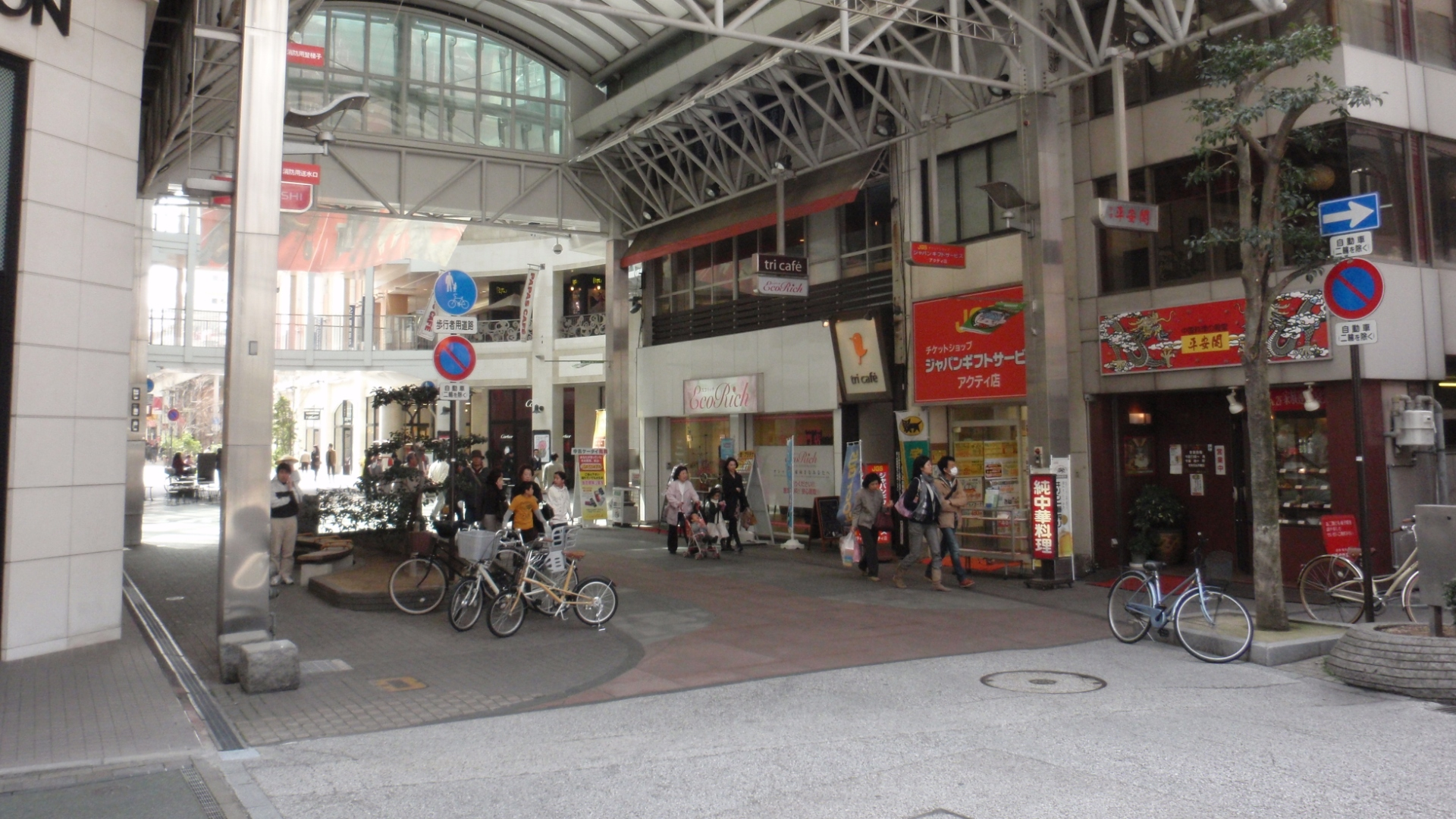 香川県高松市丸亀町にある常磐橋跡地。江戸時代はここを起点に5つの街道が各地に伸びるなど繁栄したが、明治時代に高松城外堀が埋め立てられ栗林公園東門に移築された。